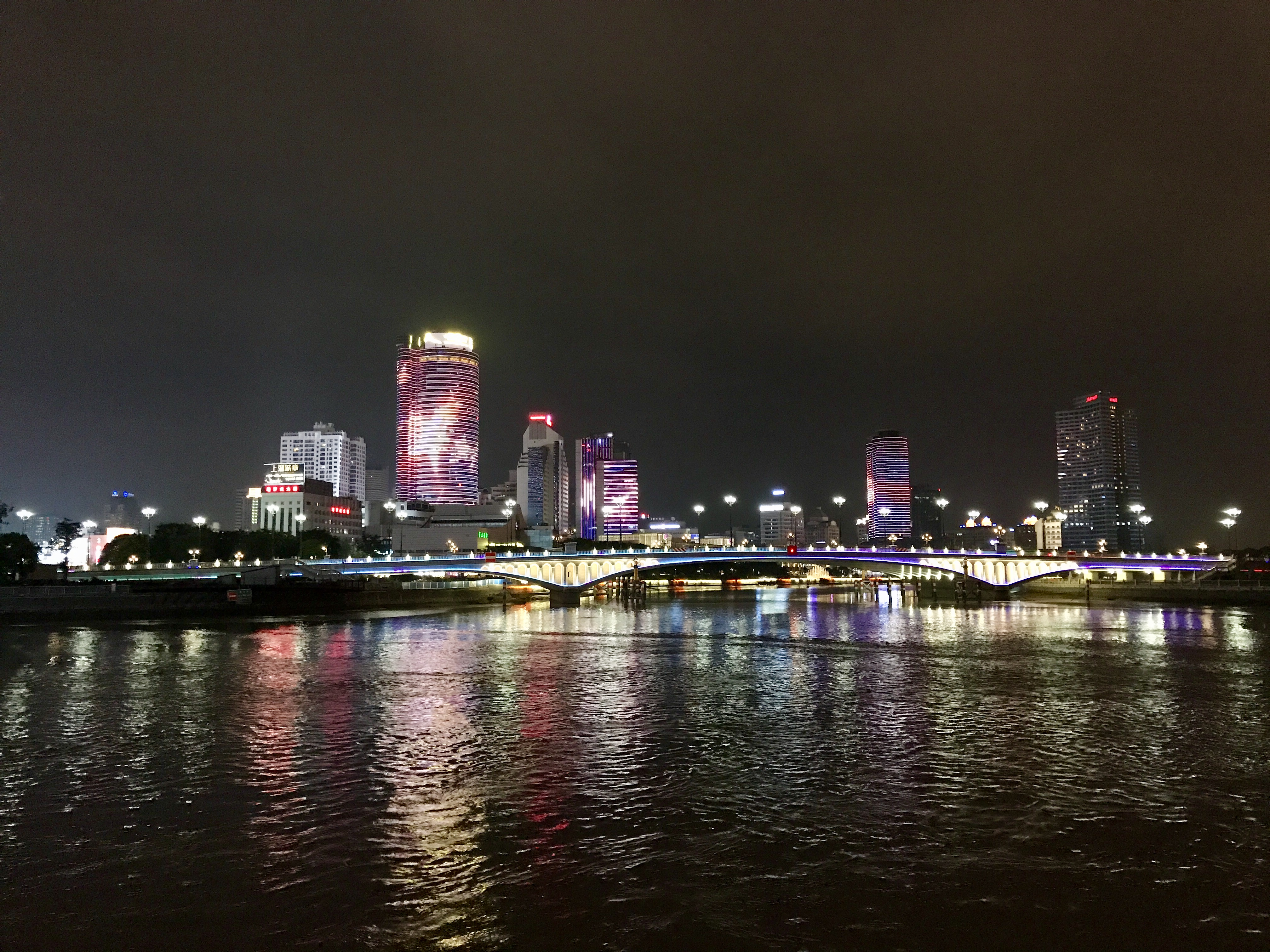 中文（中国大陆）: 该图片为从全国重点文物保护单位、联合国教科文组织认定的世界遗产大运河子项庆安会馆拍摄的大运河子项宁波三江口（6-0360）（ZD-04)甬江、姚江、奉化江交汇处。